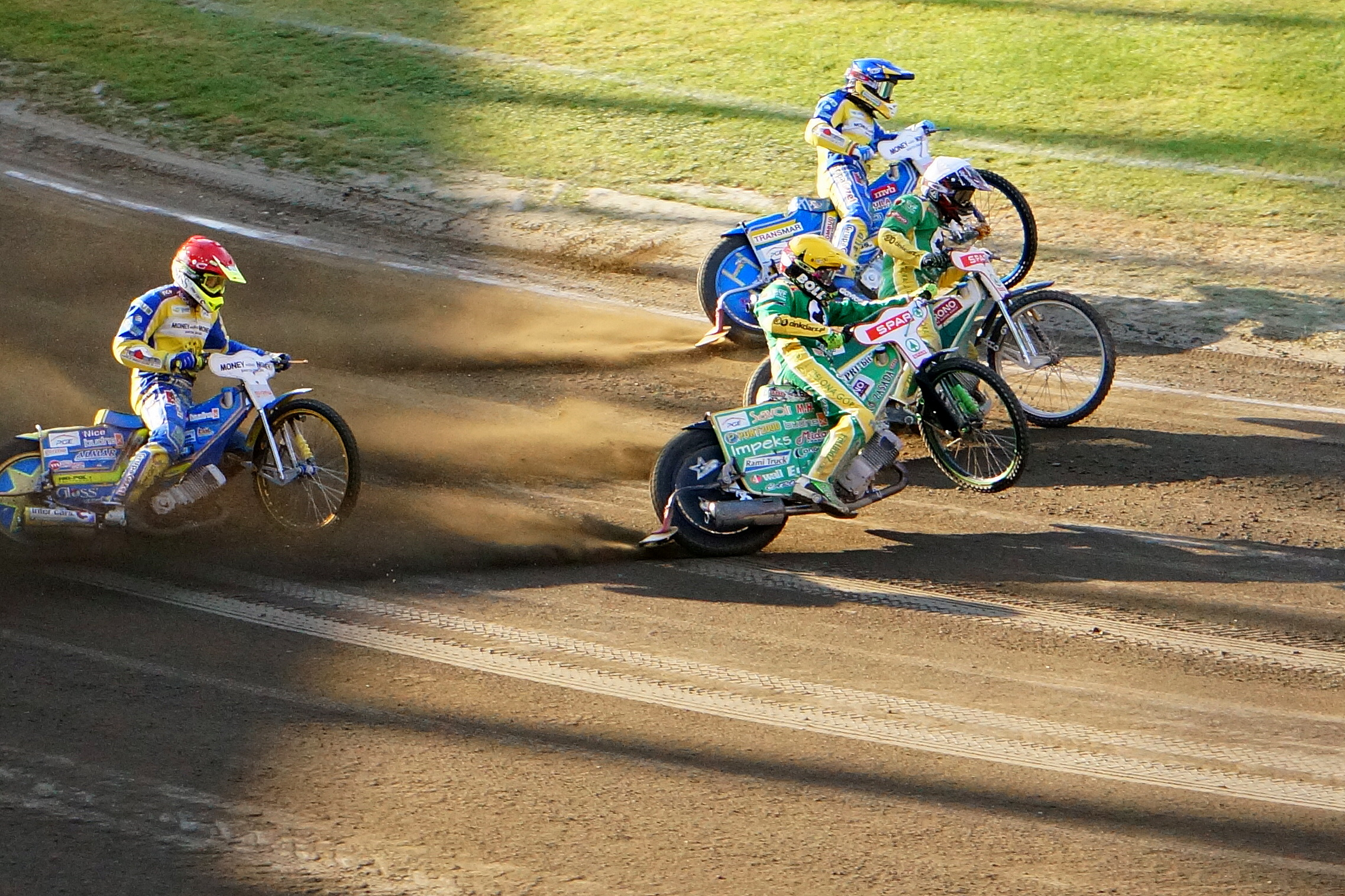 Gorzów Wlkp., 9. 08. 2015 r. Derby nr 88. Grzegorz Walasek (kask biały), Bartosz Zmarzlik (kask niebieski), Patryk Dudek (kask żółty), Krzysztof Kasprzak (kask czerwony)